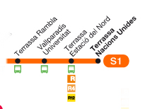 Ruta Metro Terrasa